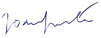 Signatura de Joan Fuster